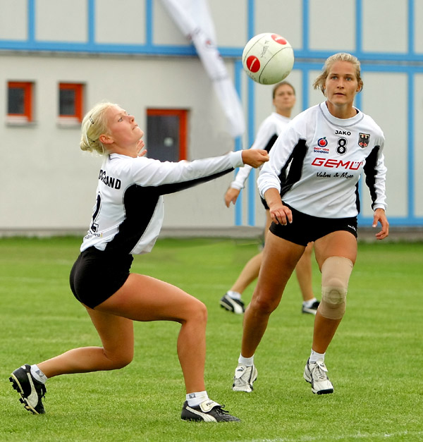 Zuspiel Janna Meiners auf Bianca Mollenhauer (BRD), EM 2004 Datum: Fri, 28 Sep 2007 17:36:21 +0200 Von: "Felix Stoeldt - Faustball" An: [...] Betreff: Re: Frauenbild für Wikipedia Hallo Ralf, [...] Hiermit erkläre ich, dass ich der Urheber des bei Wikipedia hochgeladenen Fotos bin und es für Wikipedia unter der dort angegebenen Lizenz GFDL zur Verfügung stelle. Viele Grüße Felix Stöldt